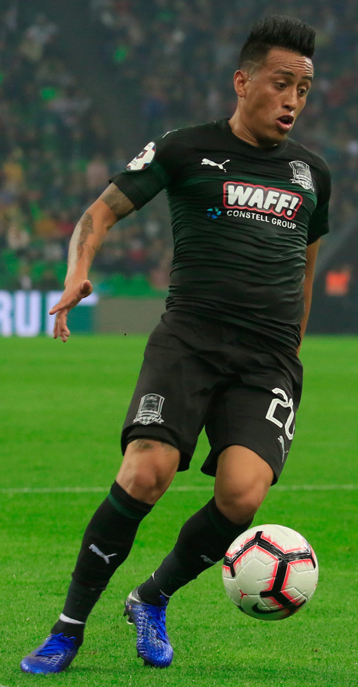 «Быки» не совладали с «Ахматом». «Зелёный» матч в Краснодаре